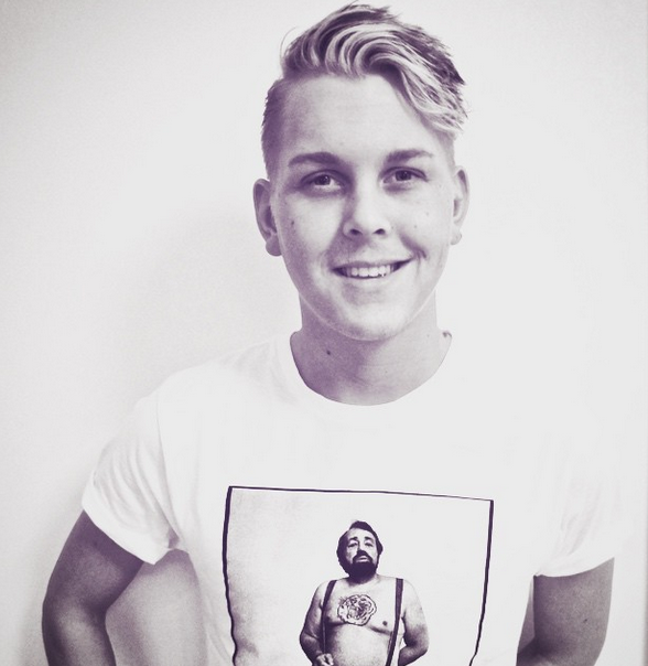 Emil Assergård, artist och låtskrivare.